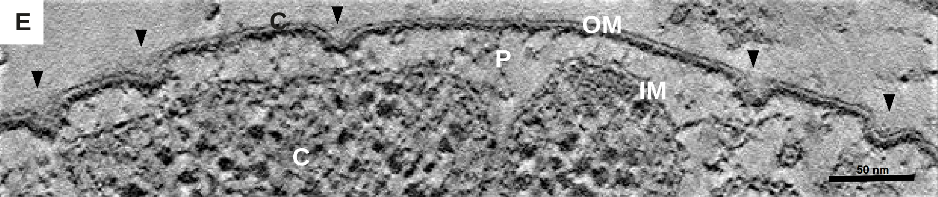 Estructuras crateriformes (puntas de flecha) en corte perpendicular de la pared.